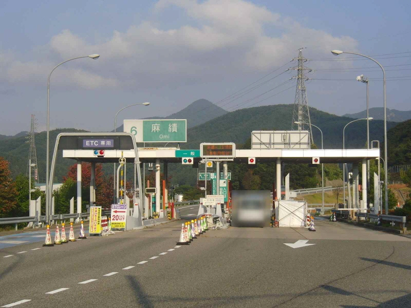 麻績インターチェンジ入口の写真です。